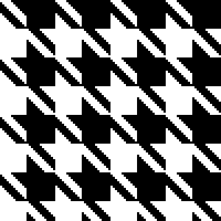 Illustration: Magnus Överengen